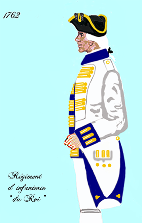 Uniform des königlich französischen Infanterie-Regiments Nr. 12 „du Roi“ 1762. - Entnommen und überarbeitet aus: „LES UNIFORMES ET LES DRAPEAUX DE L'ARMÉE DU ROI“ Marseille 1899. (L'uniforme du 12e régiment française d'infanterie royale „du Roi“ en 1762.)